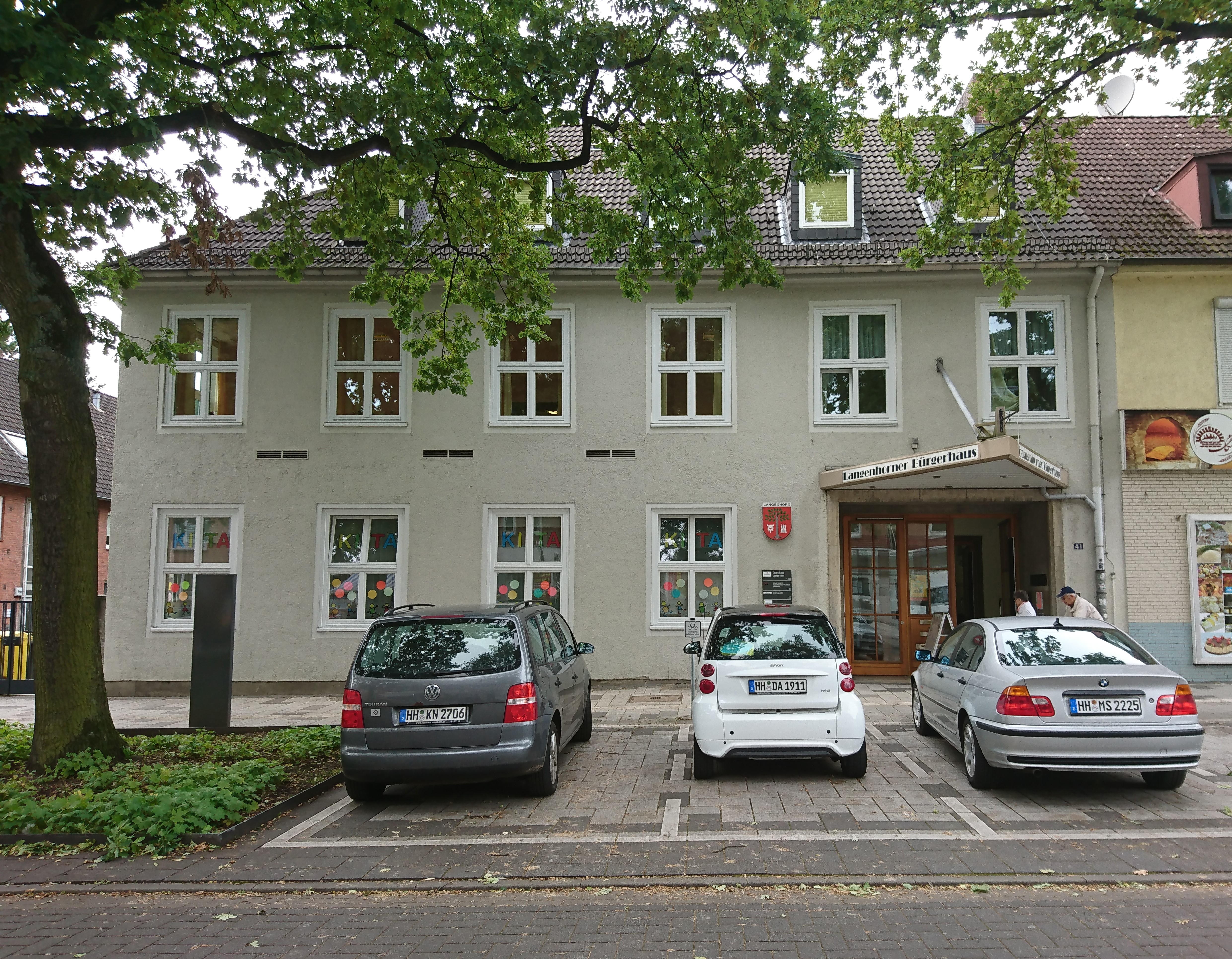 Langenhorner Bürgerhaus, Tangstedter Landstraße 41